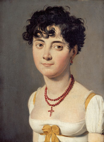 Louis-Léopold Boilly (Français, 1761-1845): Madame Fouler, comtesse de Relingue, née d'Avrange, vers 1810, huile sur toile, 22 cm x 17 cm, Paris, Fondation Napoléon (donation Lapeyre), France.[1]